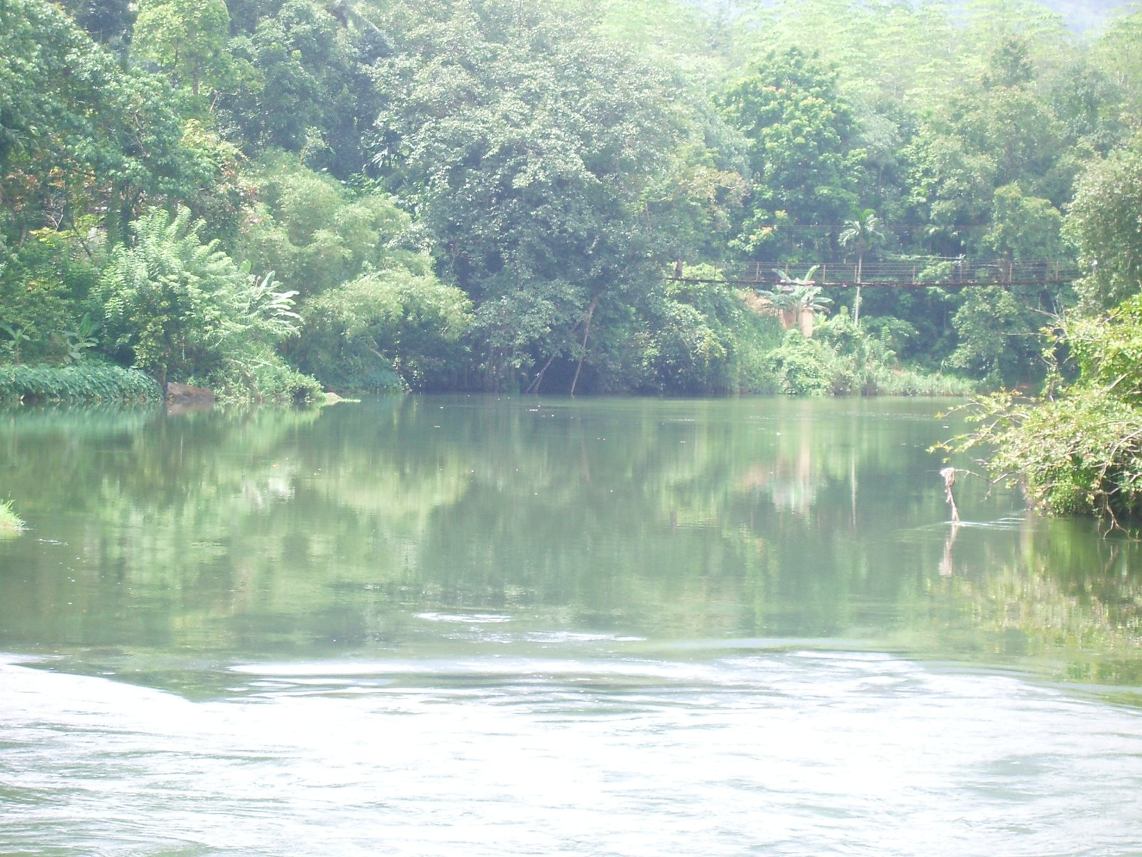 Lloc del centre d'Sri Lanka on es va filmar l'escena culminant de la pelicula "El pont damunt el riu Kwai" (guanyadora de set Oscars), rodada en la seva major part a Tailàndia; foto feta per J. Ollé el juliol del 2006